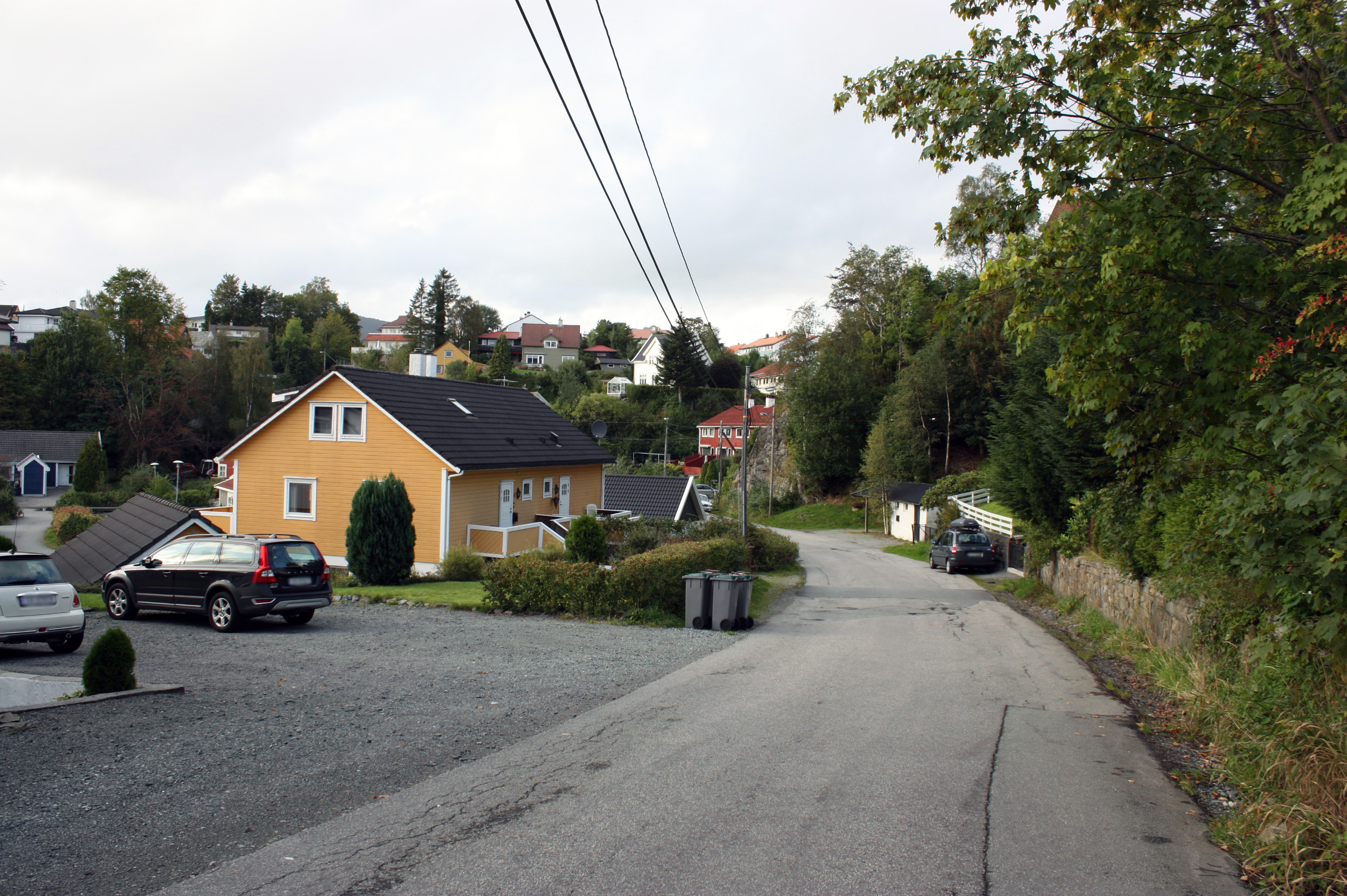 Kloppedalsvegen, Fana, Bergen.